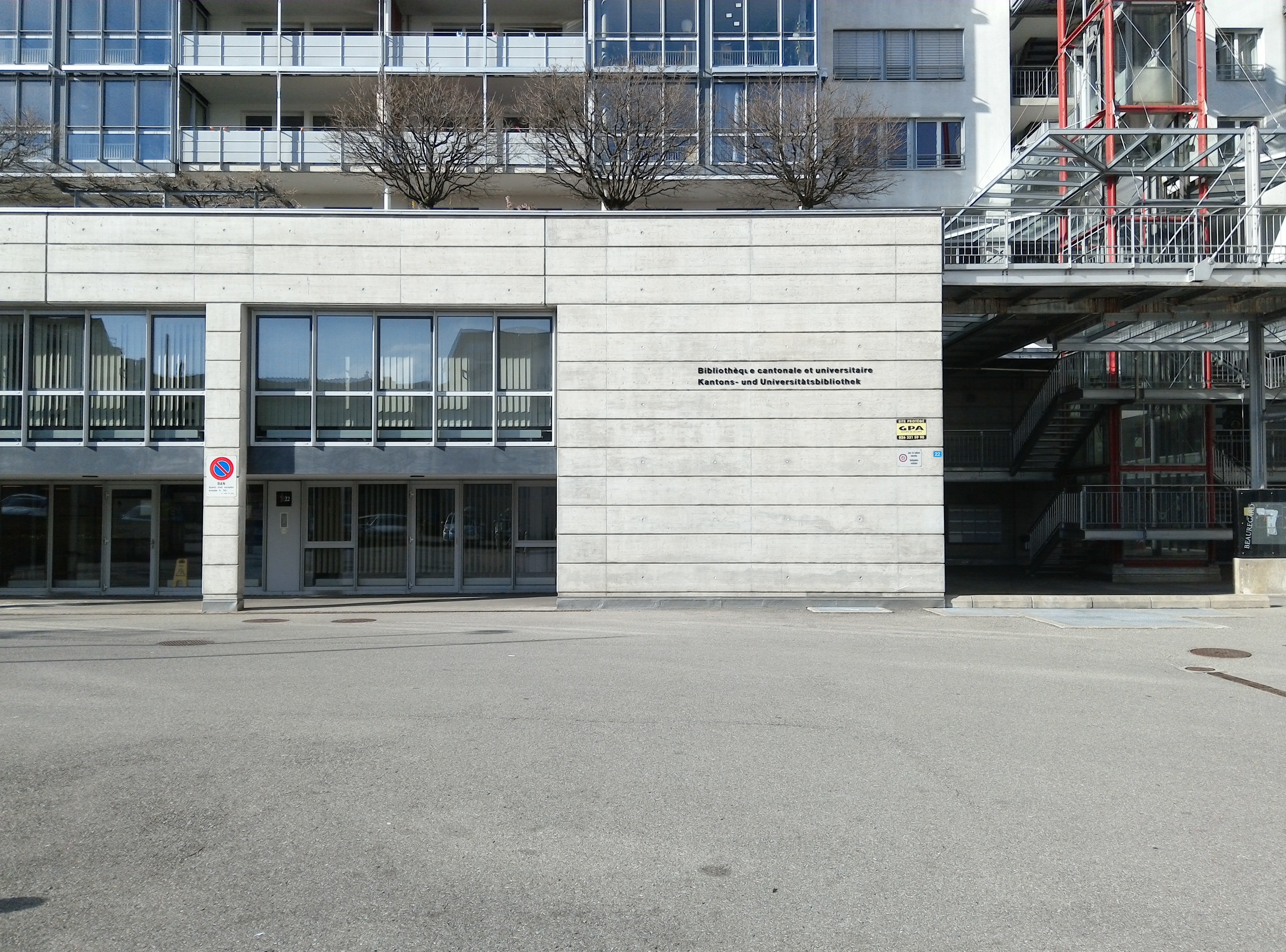 Aussenstelle der Kantons- und Universitätsbibliothek (BCUF), Freiburg, Schweiz.